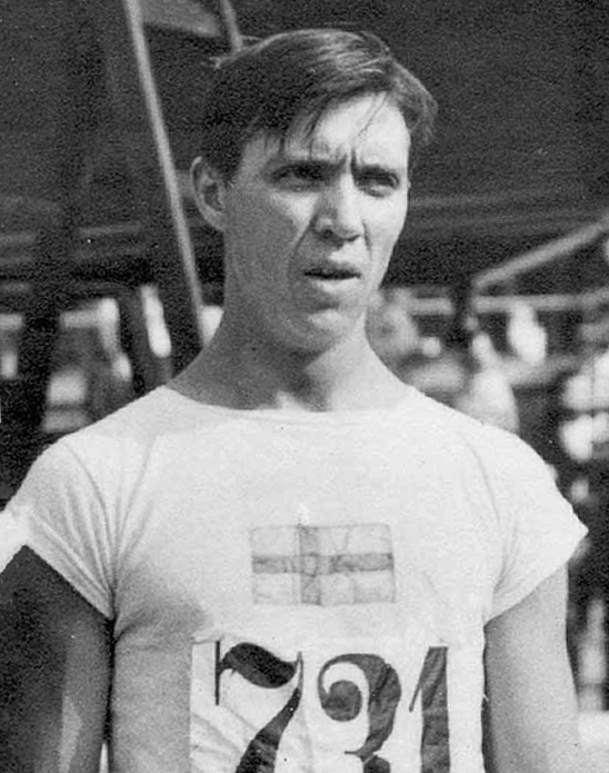 John Eke